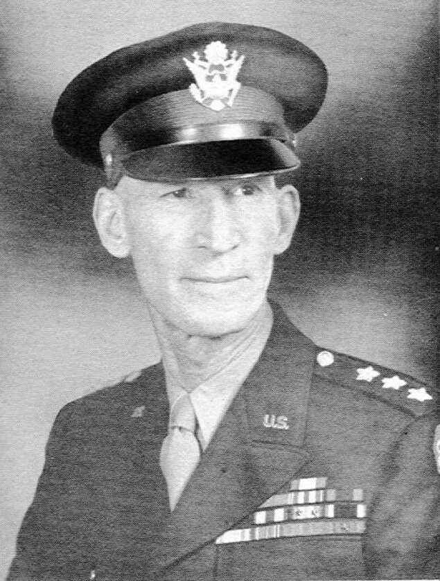 Lieutenant General William H. Simpson, US Army